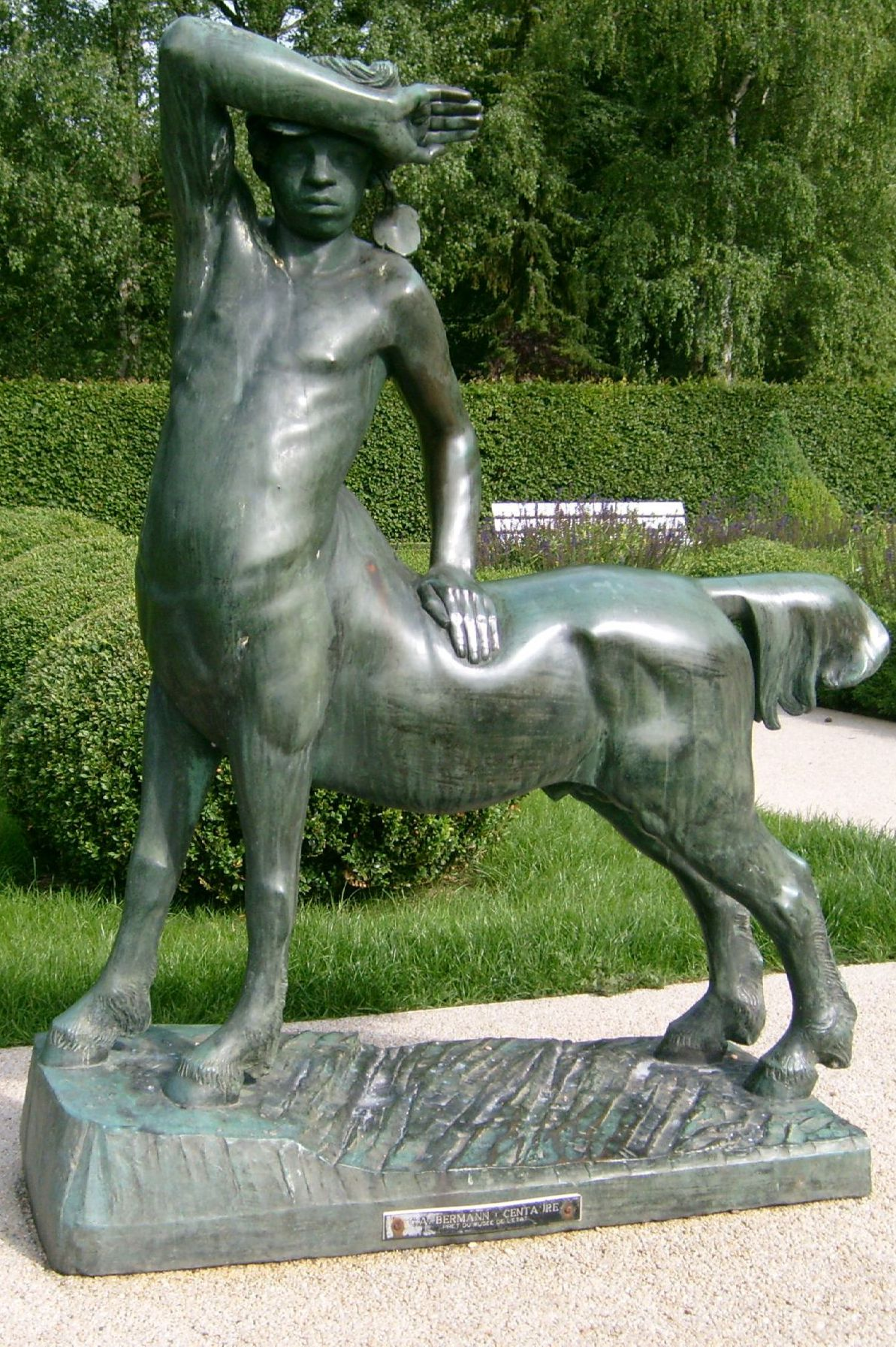 Le Centaure, Bronze vum Cipri Adolf Bermann am neien "Jardin français" virun der Orangerie am Park vum Thermalbad zu Munneref